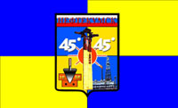 Флаг города Нефтекумск